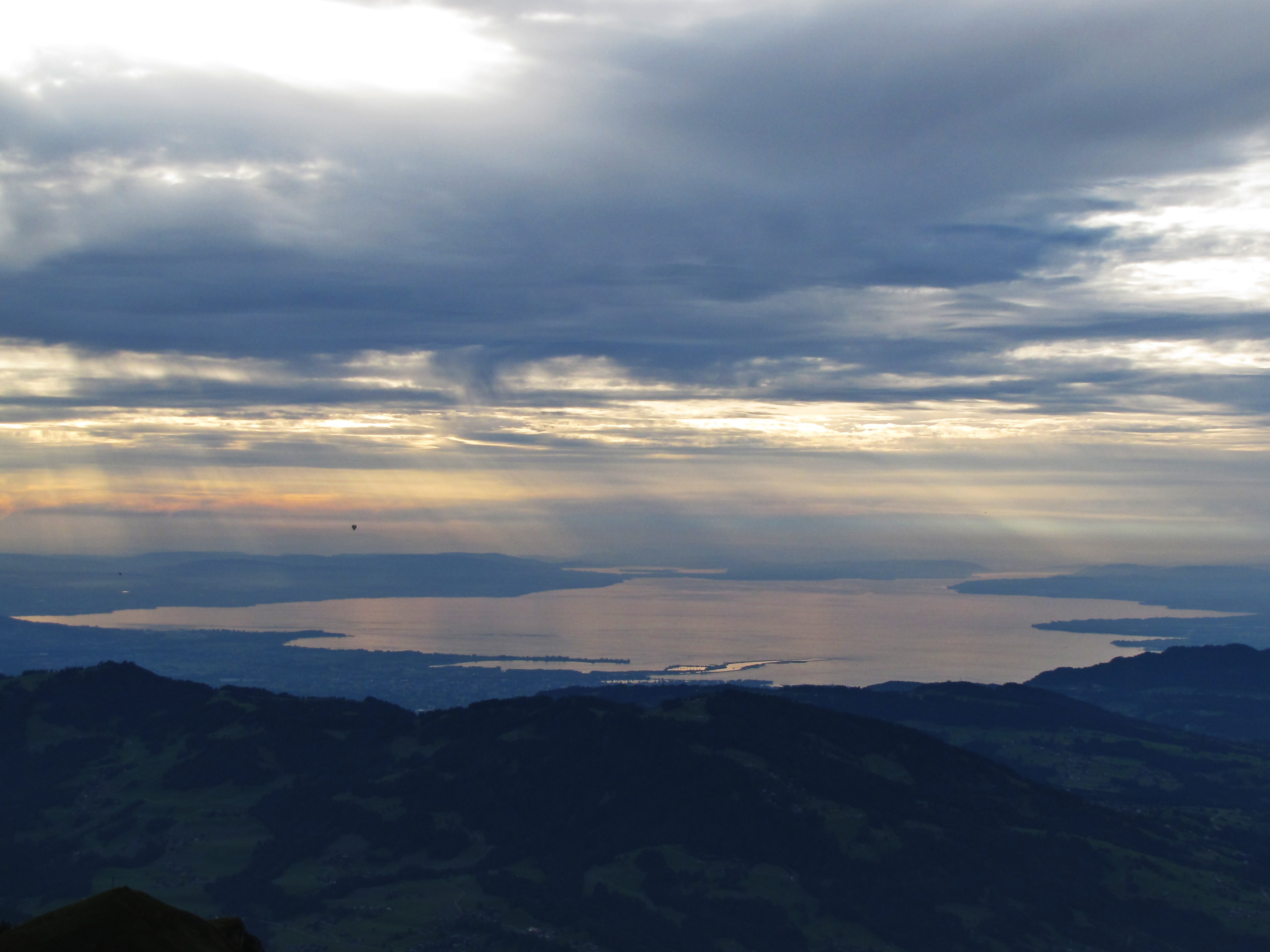 Abendlicher Blick von der Winterstaude (1877 m) auf den Bodensee (395 m), der in seiner Ost-West-Ausdehnung zu sehen ist.